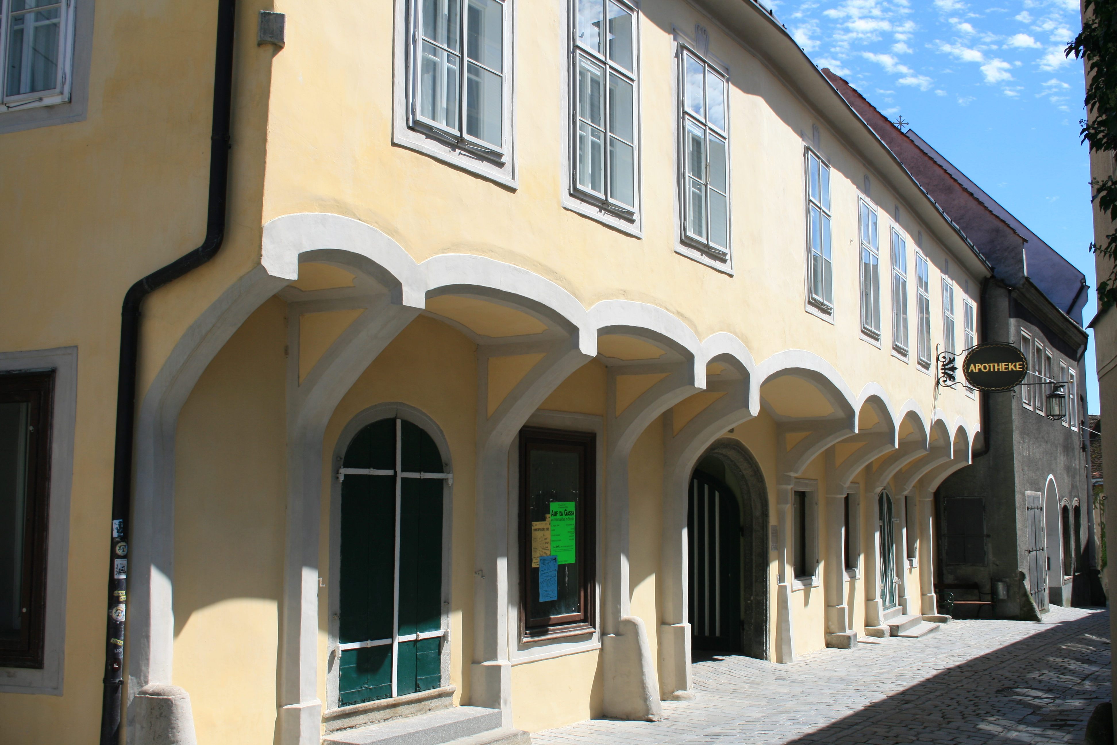 Der Dunklhof in Steyr (Kirchengasse 16), ist ein spätgotisches Bürgerhaus und war Sitz der niederen Gerichtsbarkeit.